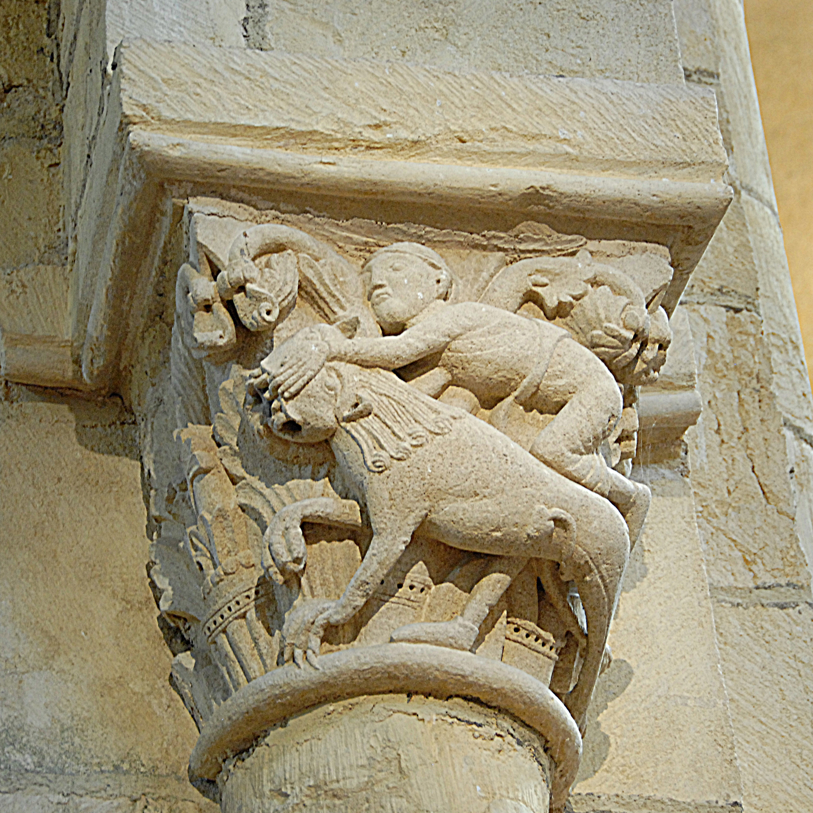 Kapitell, Daniel in Löwengrube